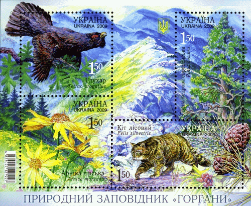 Поштовий блок «Природний заповідник „Горгани“»